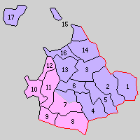 福岡県宗像郡の町村制時点の町村。